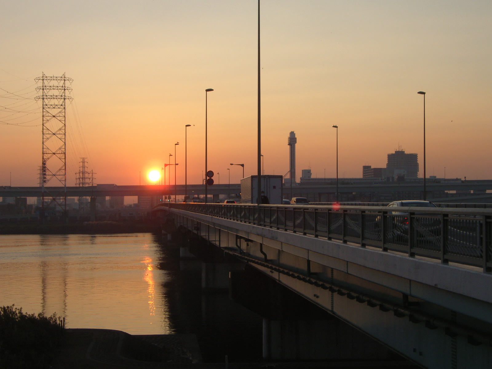 sunrise in Funabori Bridge